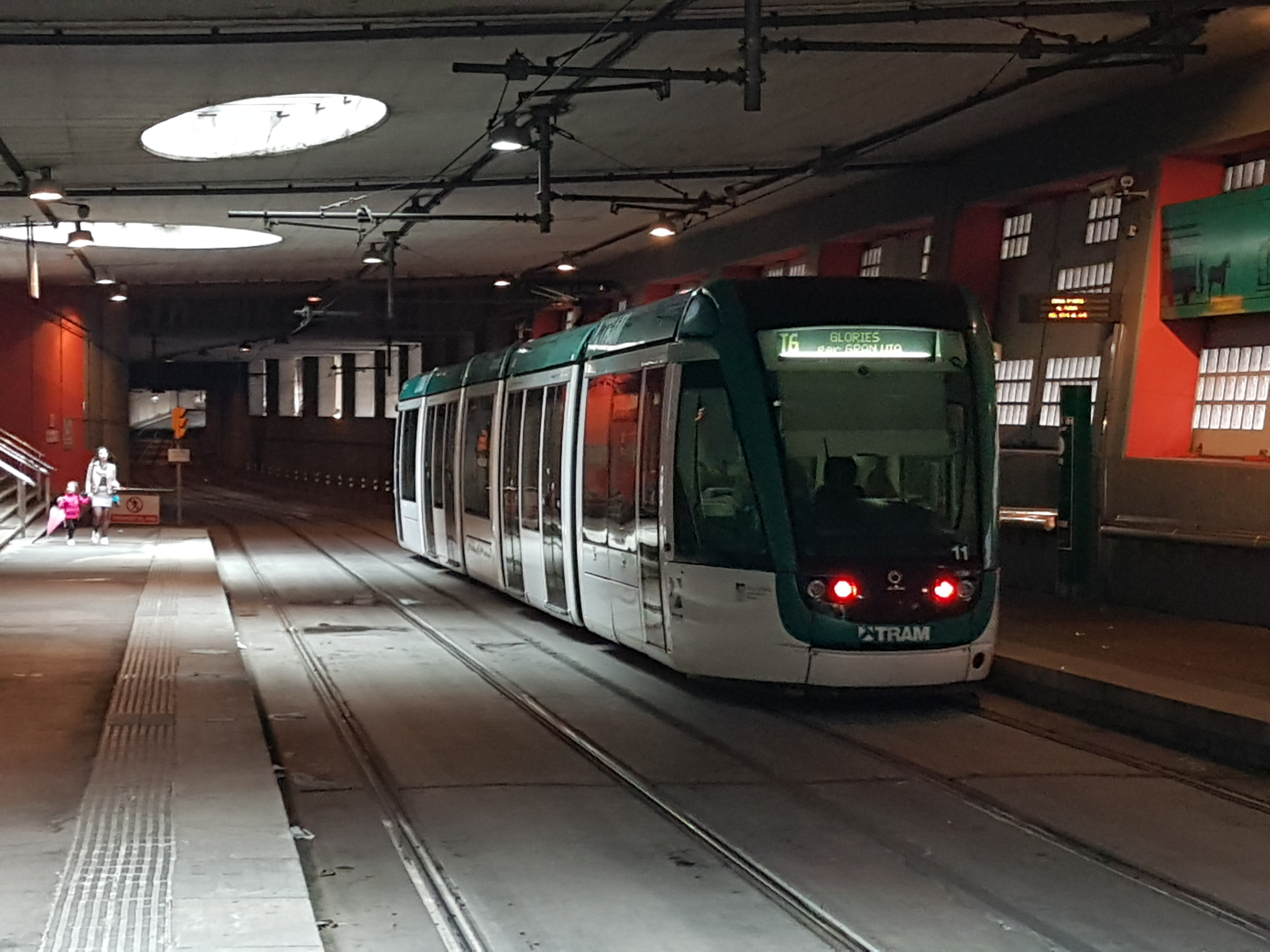 Tramvia Citadis 302 de la línia T6 destinació Glòries a l'estació de Besòs